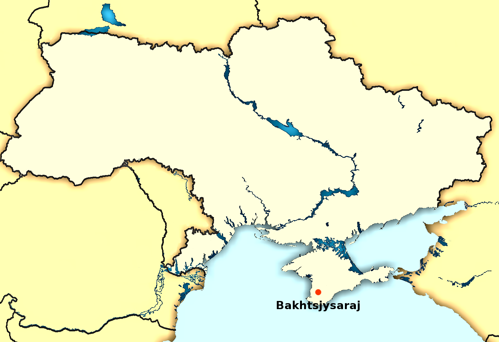 Plasseringen av Bakhtsjysaraj i Ukraina